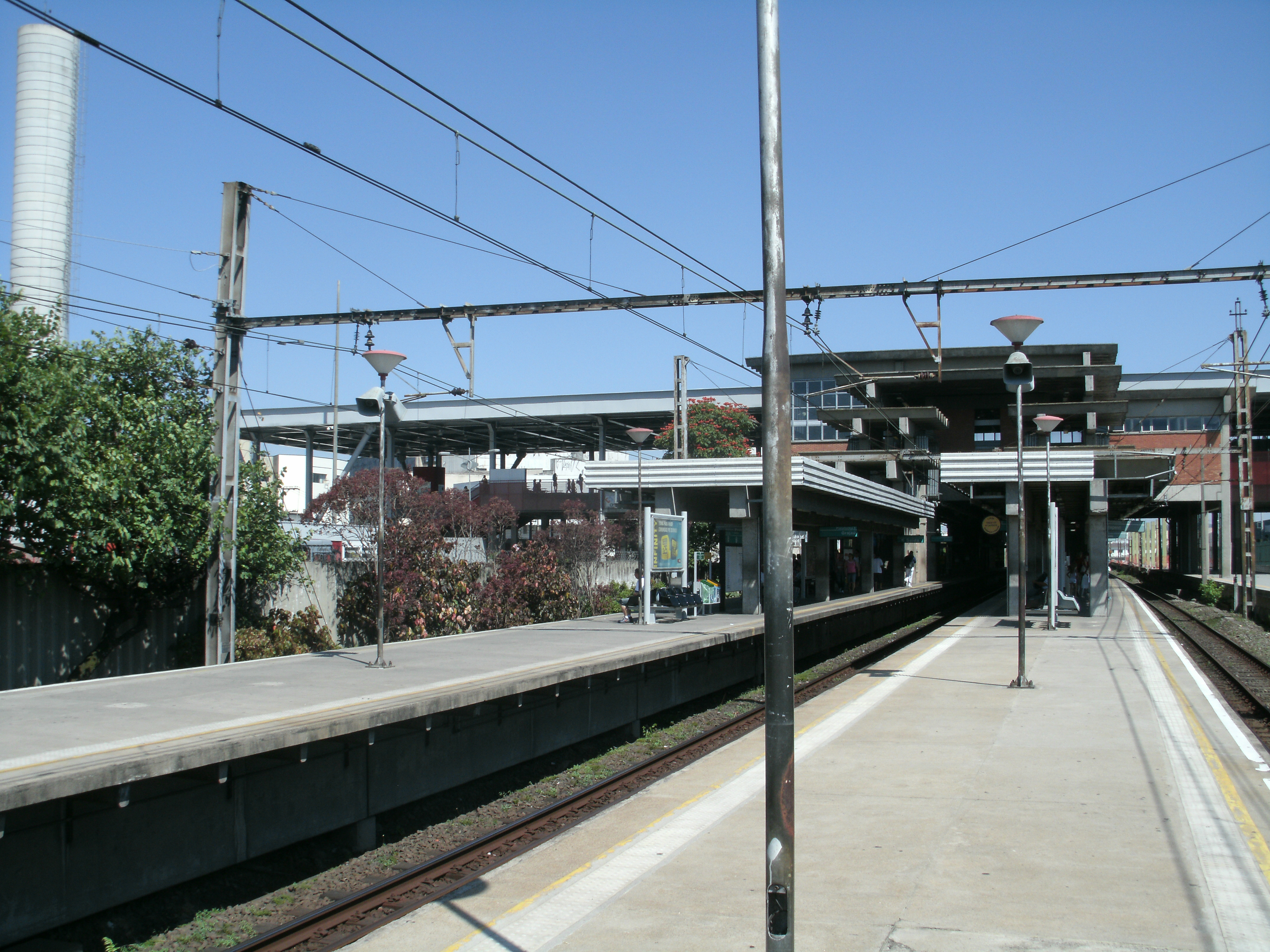 Estação Osasco da CPTM